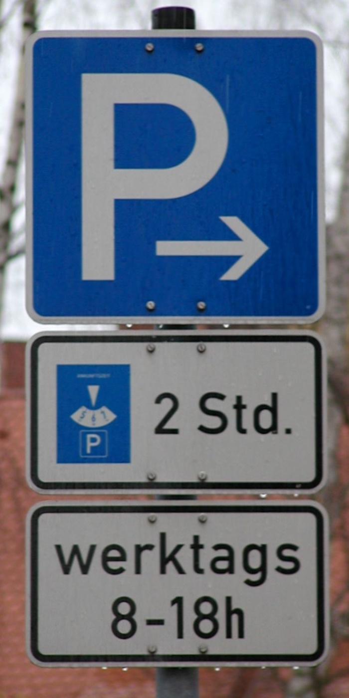 Schild Parkplatz - Werktag